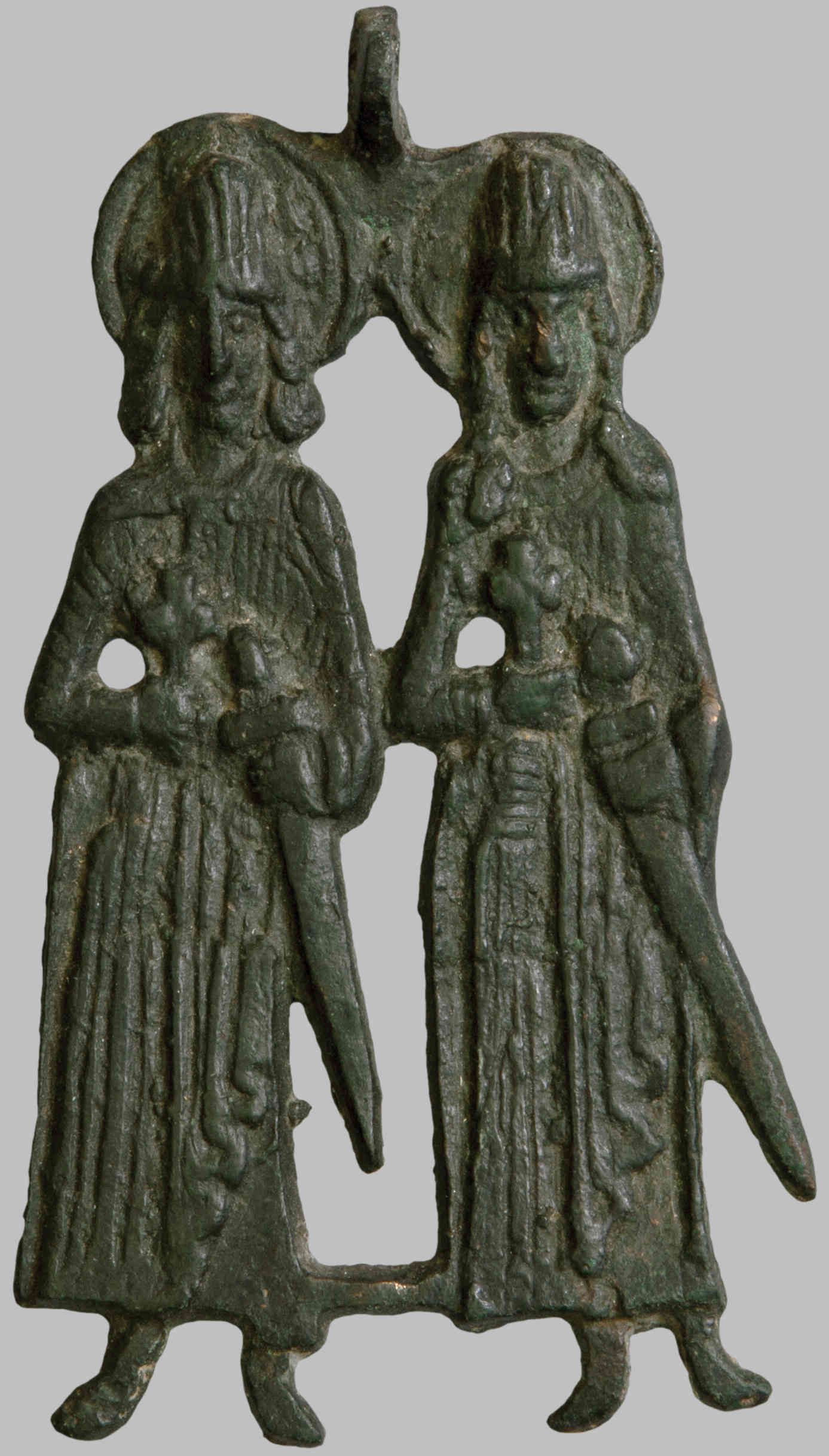 11×6,5×1 см